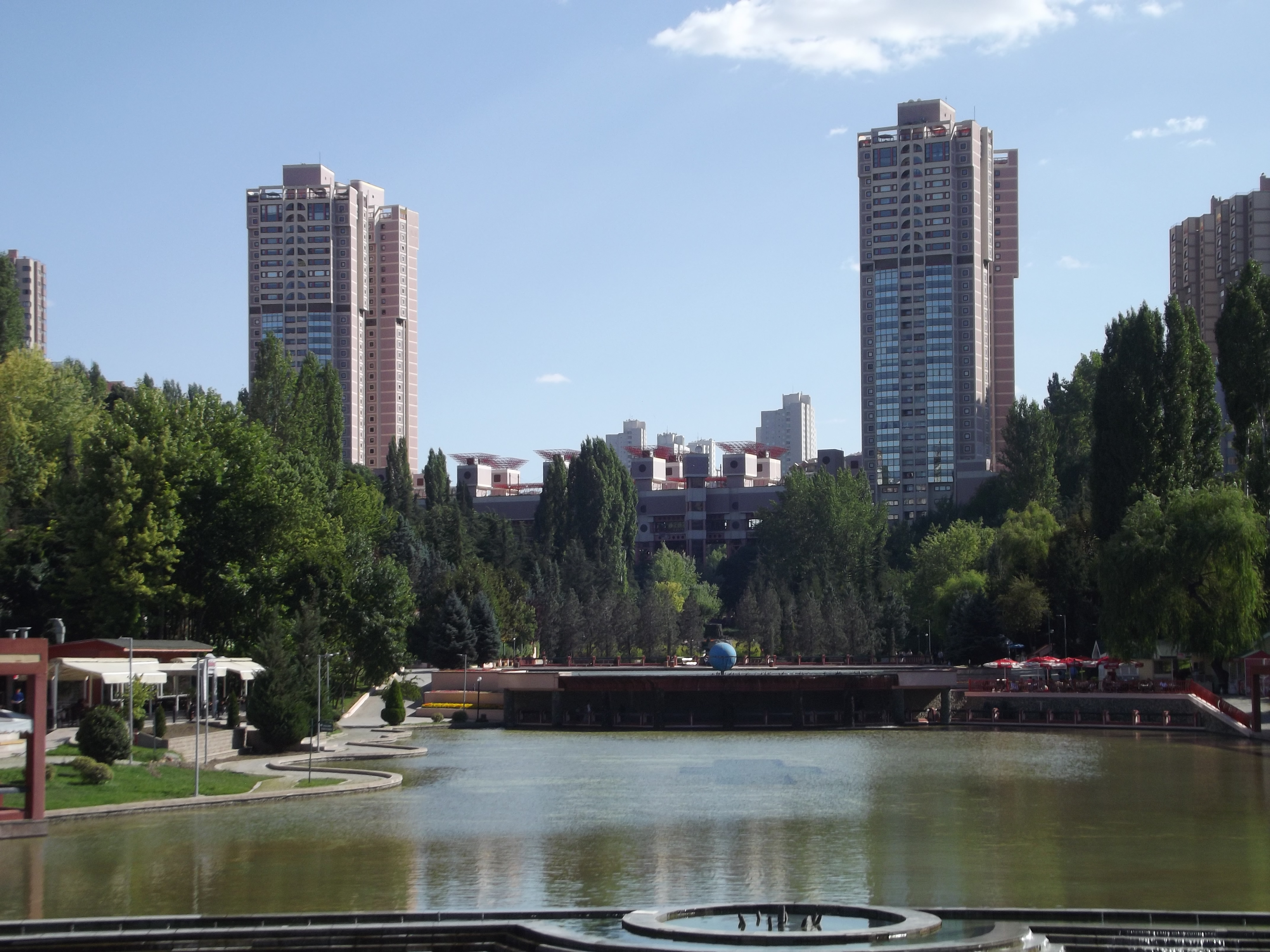 Dikmen Vadisi 22082012